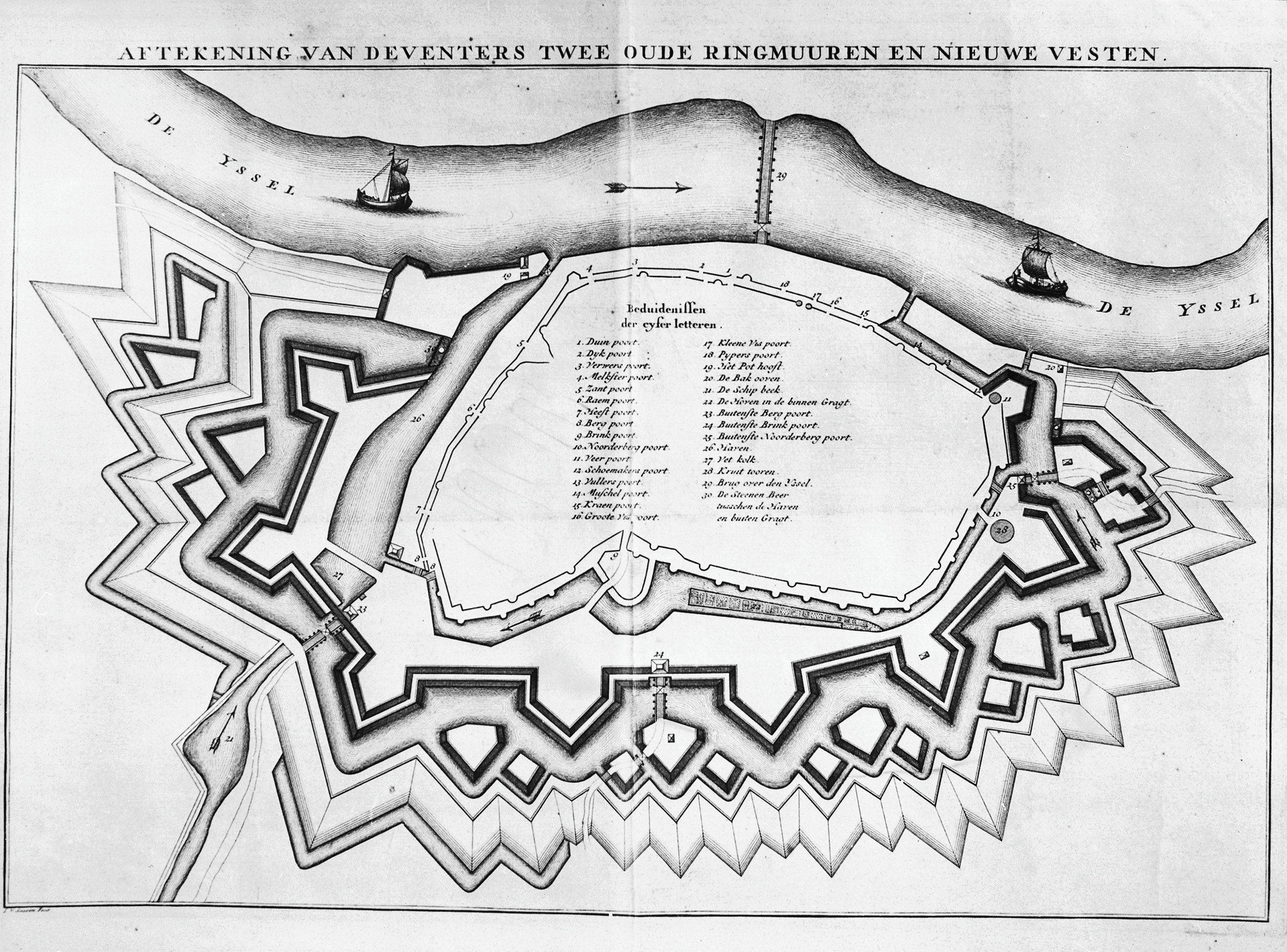 plattegrond van aftekening van Deventers twee oude ringmuren en nieuwe vesten